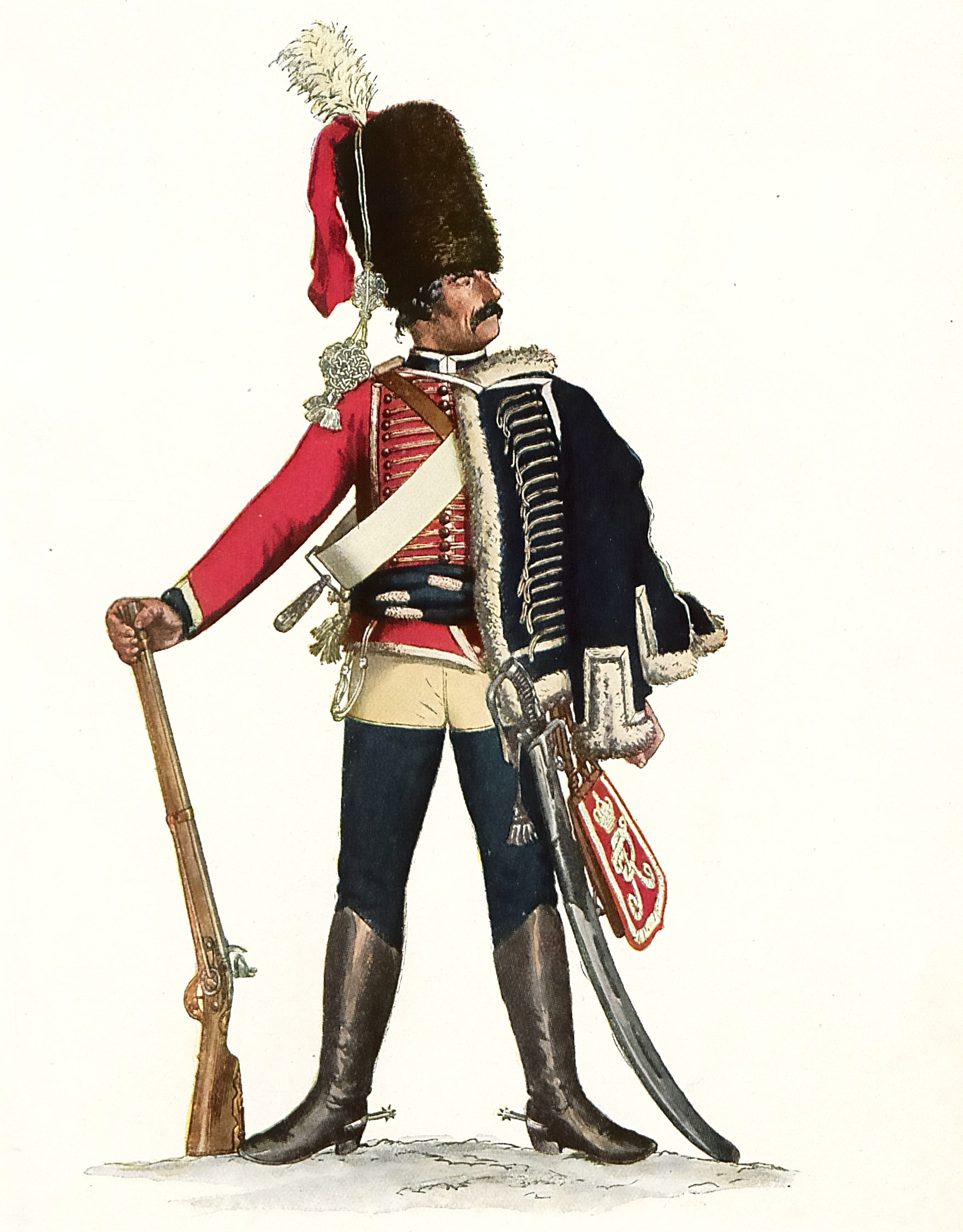 Zietenhusar aus der Zeit Friedrich des Großen